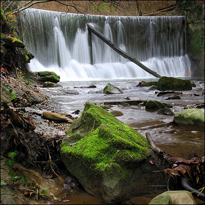 Wasserfall am Wildbach in Embrach